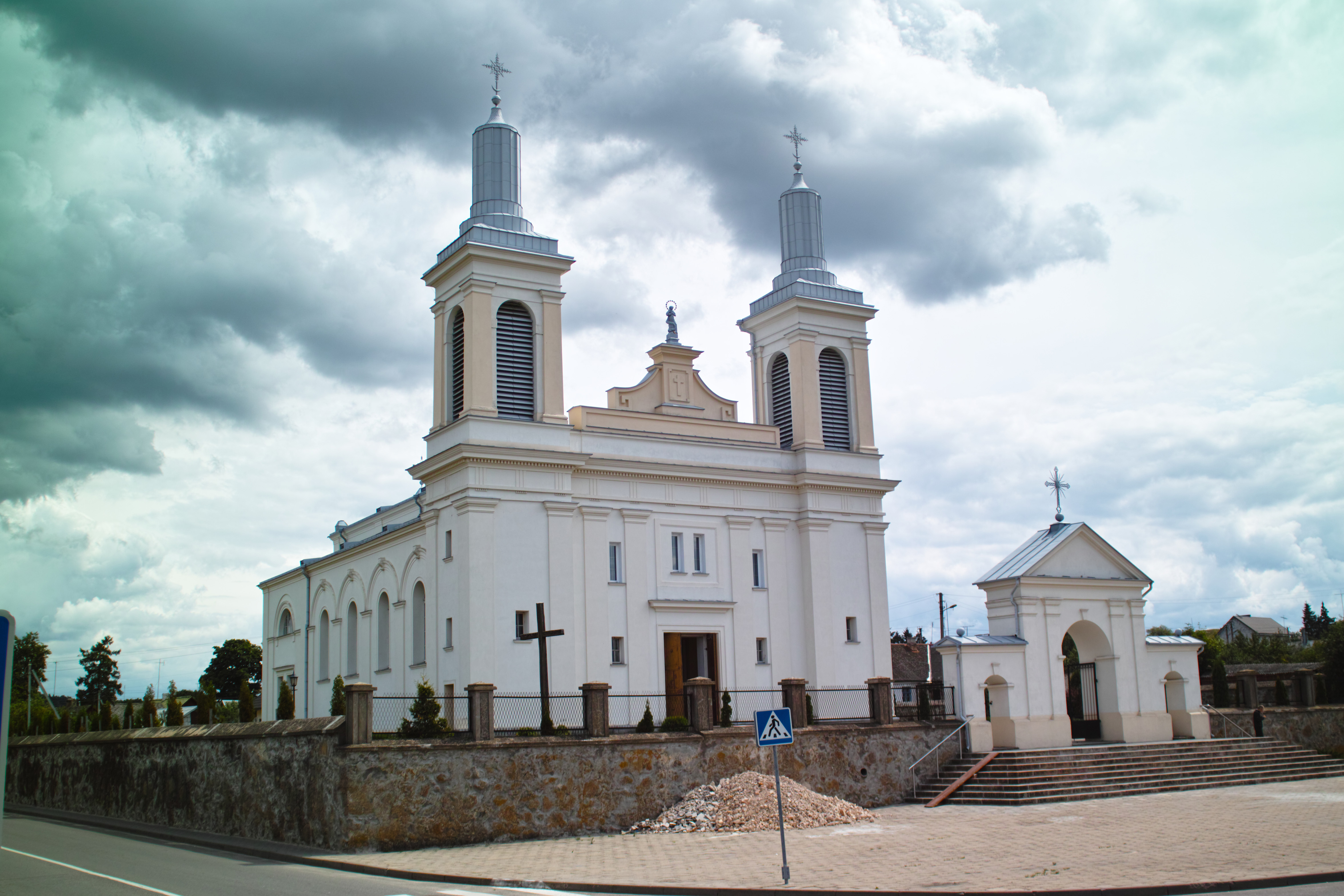 Беларуская (тарашкевіца): Касьцёл Сьв. Вацлава з агароджай і брамай. г. Ваўкавыск This is a photo of Belarusian heritage monument. Reference number: 413Г000085 ( WLM)